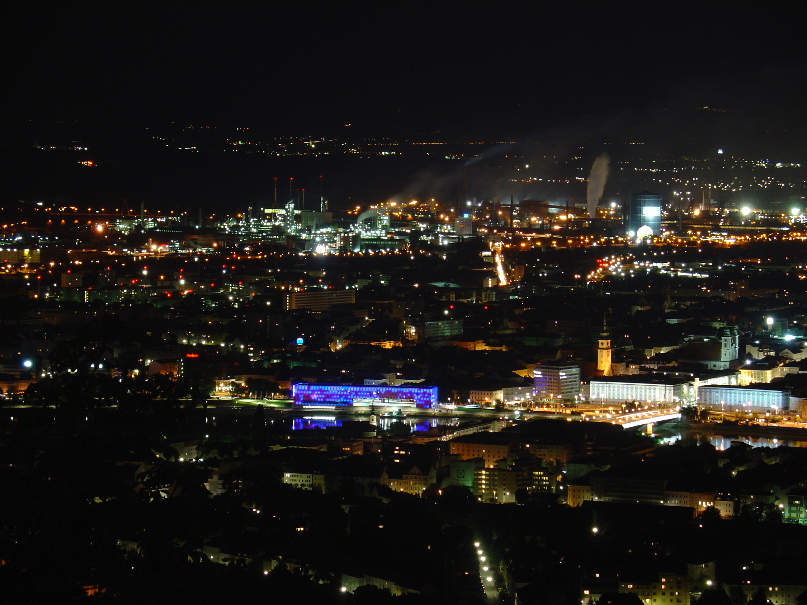 Linz/Donau bei Nacht. Zu sehen sind u. a. das Stadtzentrum, Brückenkopfgebäude, Nibelungenbrücke, Lentos, Vöest und die Donau.